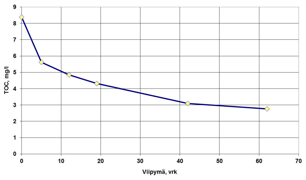 Tekopohjaveden muodostumiskokeet keinoharjussa Harjavallassa vuonna 2001. TOC-pitoisuuden (orgaanisen hiilen kokonaismäärä) aleneminen eri näytteenottopisteissä.